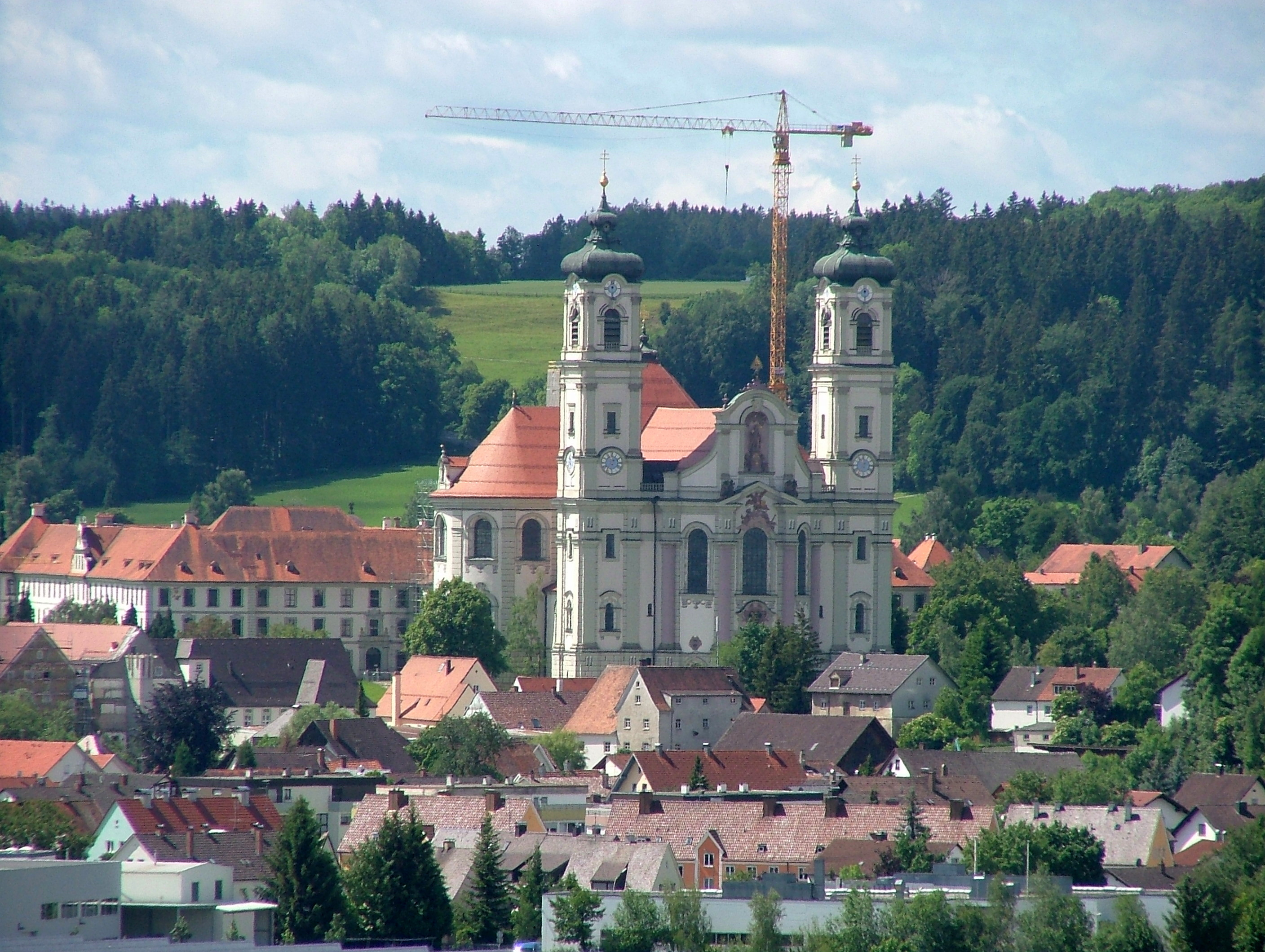 Ottobeuren